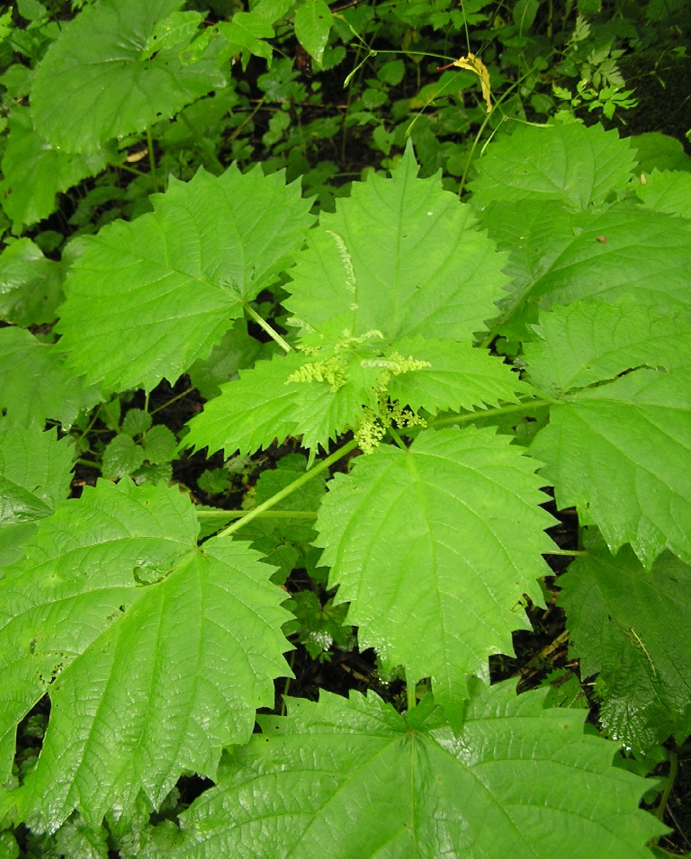 Laportea cuspidata (Syn. Laportea macrostachya) in einem Bergwald nahe Kamikochi (japanische Alpen).